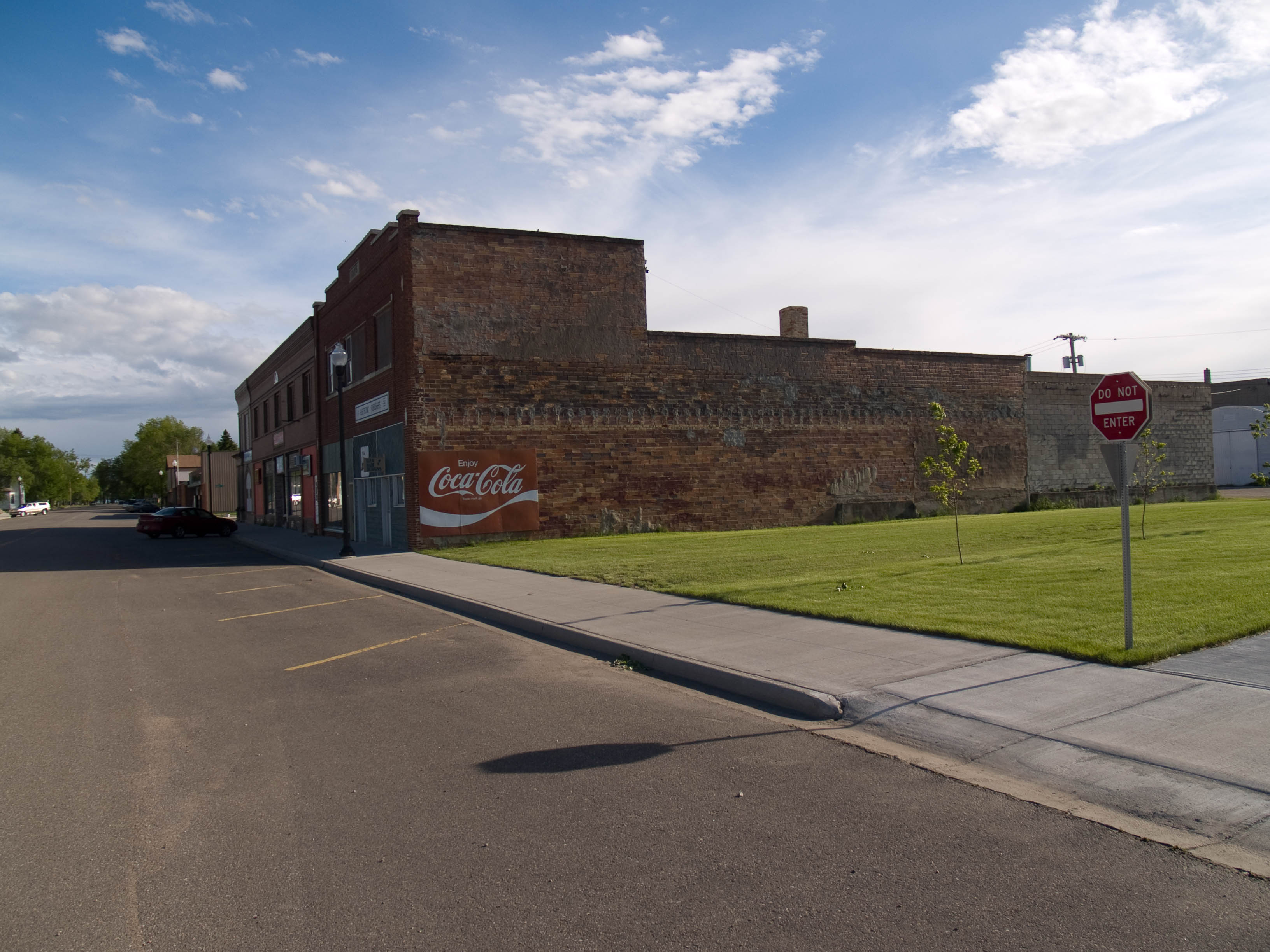 Kulm, North Dakota